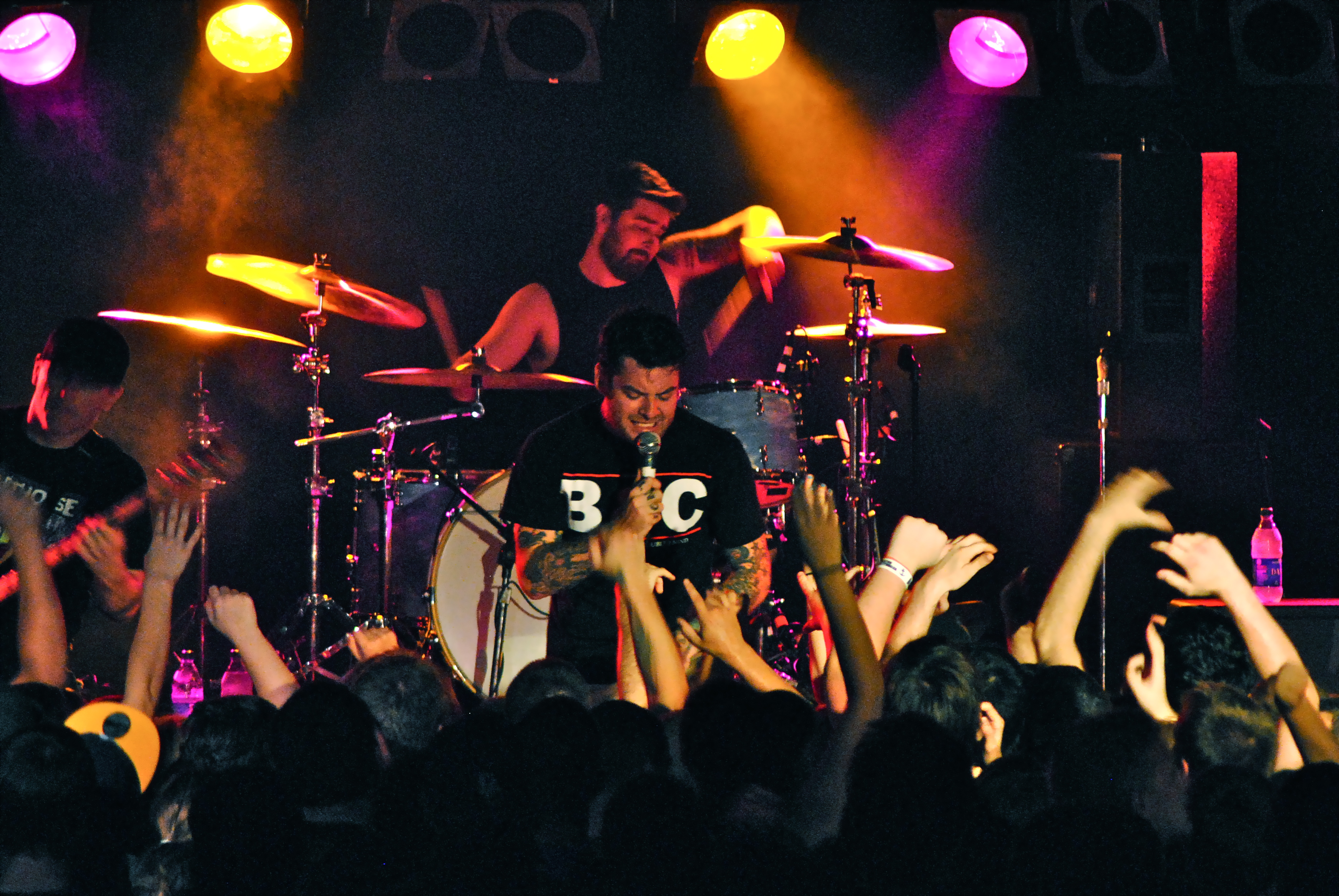 Senses Fail Hangar 84 Vineland, NJ 7/15/11